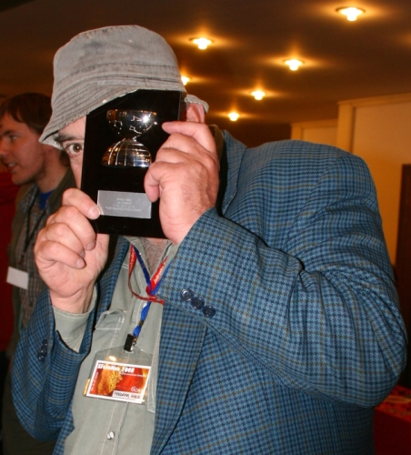 Predrag Raos na SFeraKonu u Zagrebu